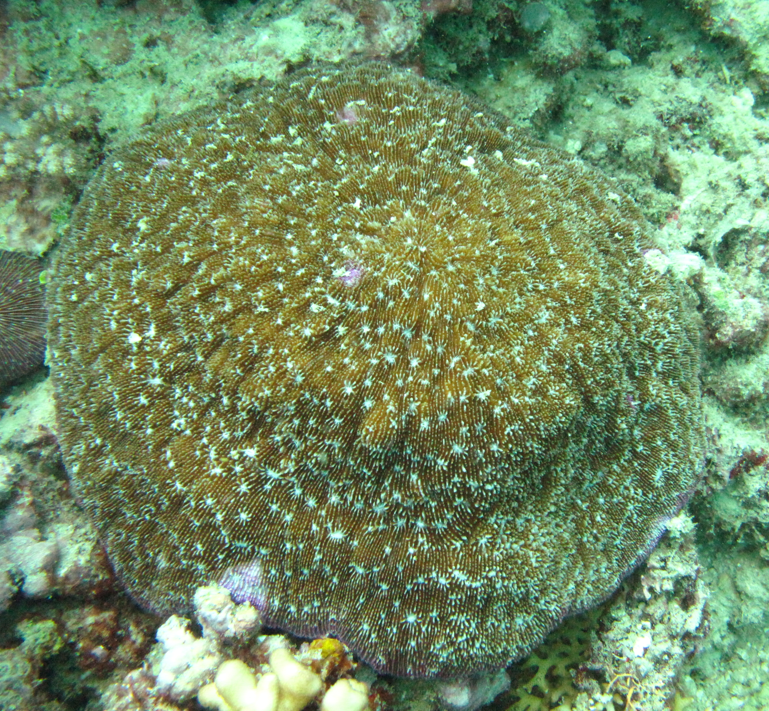 Halomitra pileus en el arrecife de isla Mer, Estrecho de Torres, Australia. ID reviewed by Dr. Bert W. Hoeksema.